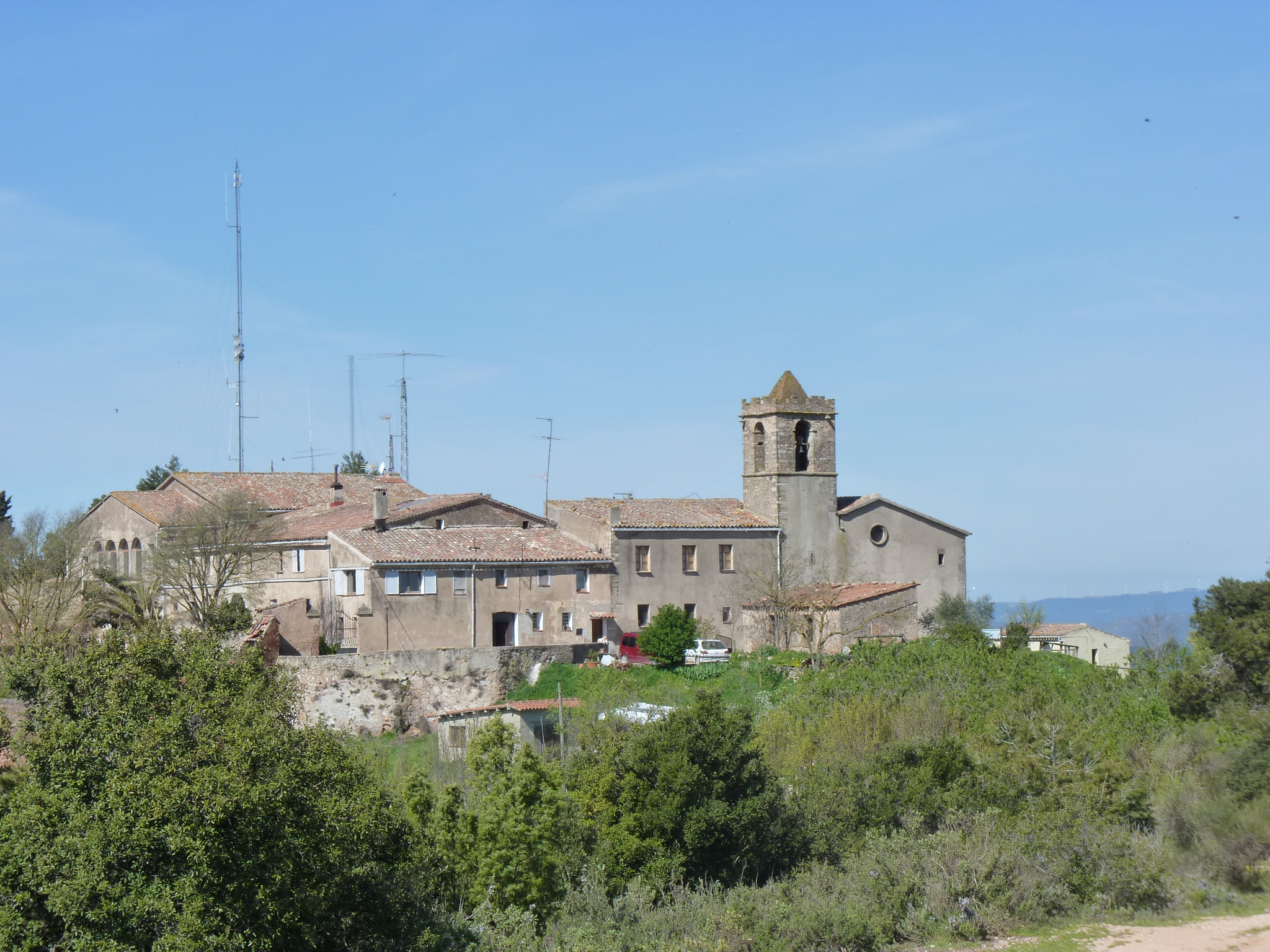 Nucli i església de Sant Pau de la Guàrdia, pertanyent al municipi del Bruc